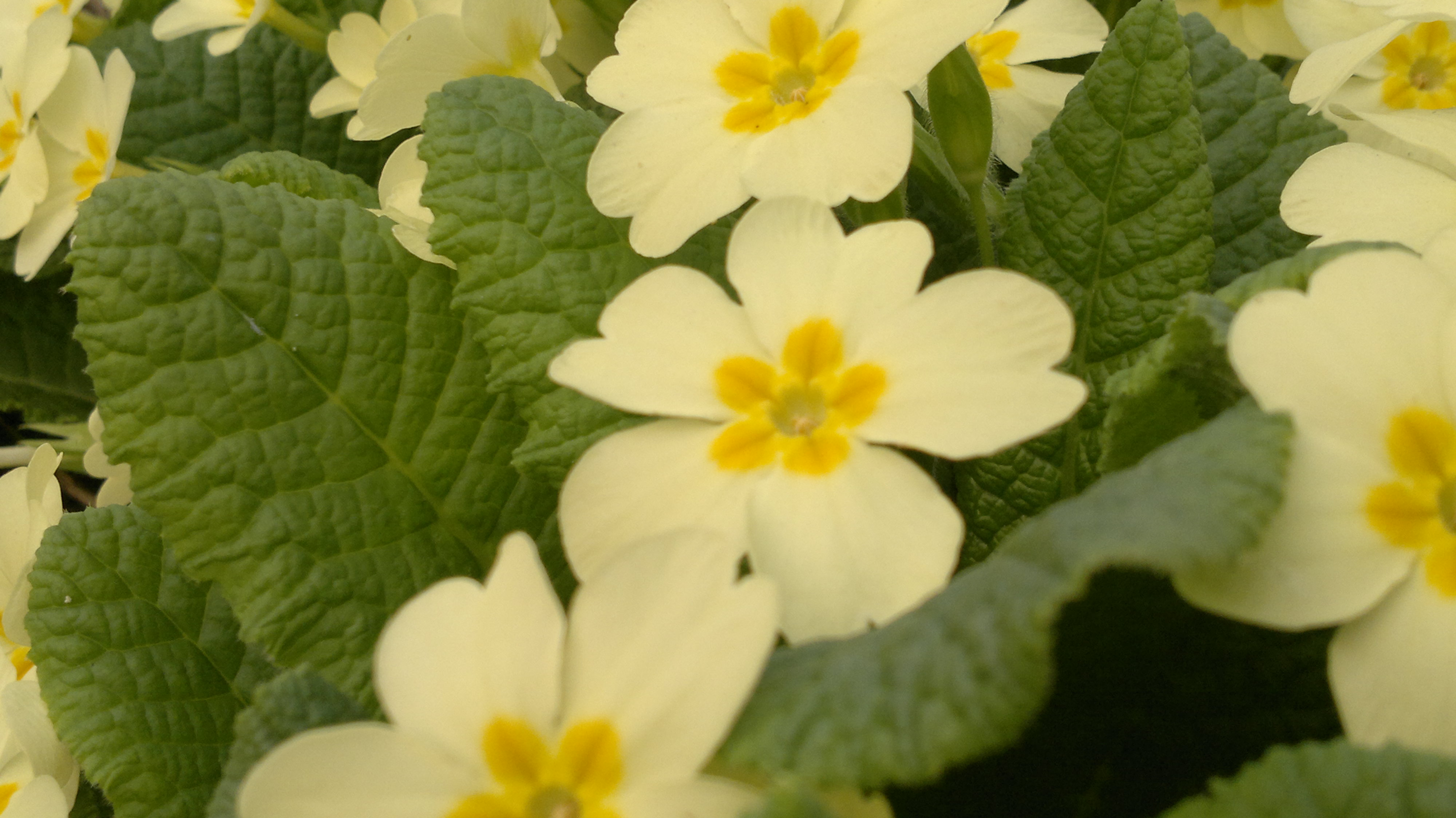 Alcune primule nel mio giardino Unknown